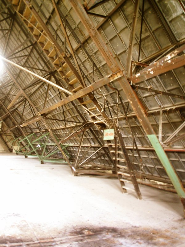 Innenaufnahme der Wilthener Halle (1. Drittel der alten Dresdner Militärluftschiffhalle, heute Lager der Hardenberg-Wilthen AG)